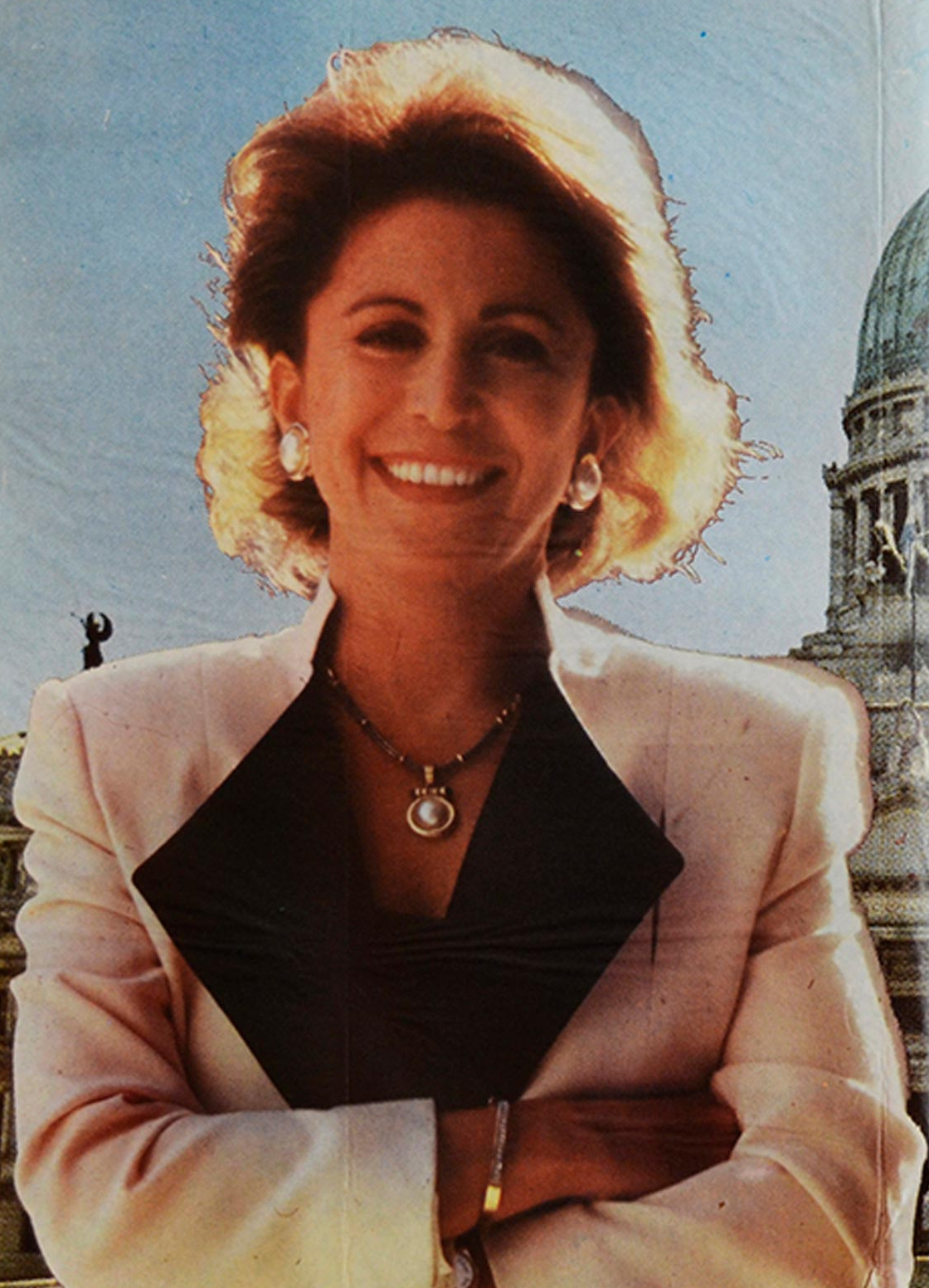 María Julia Alsogaray, política argentina.